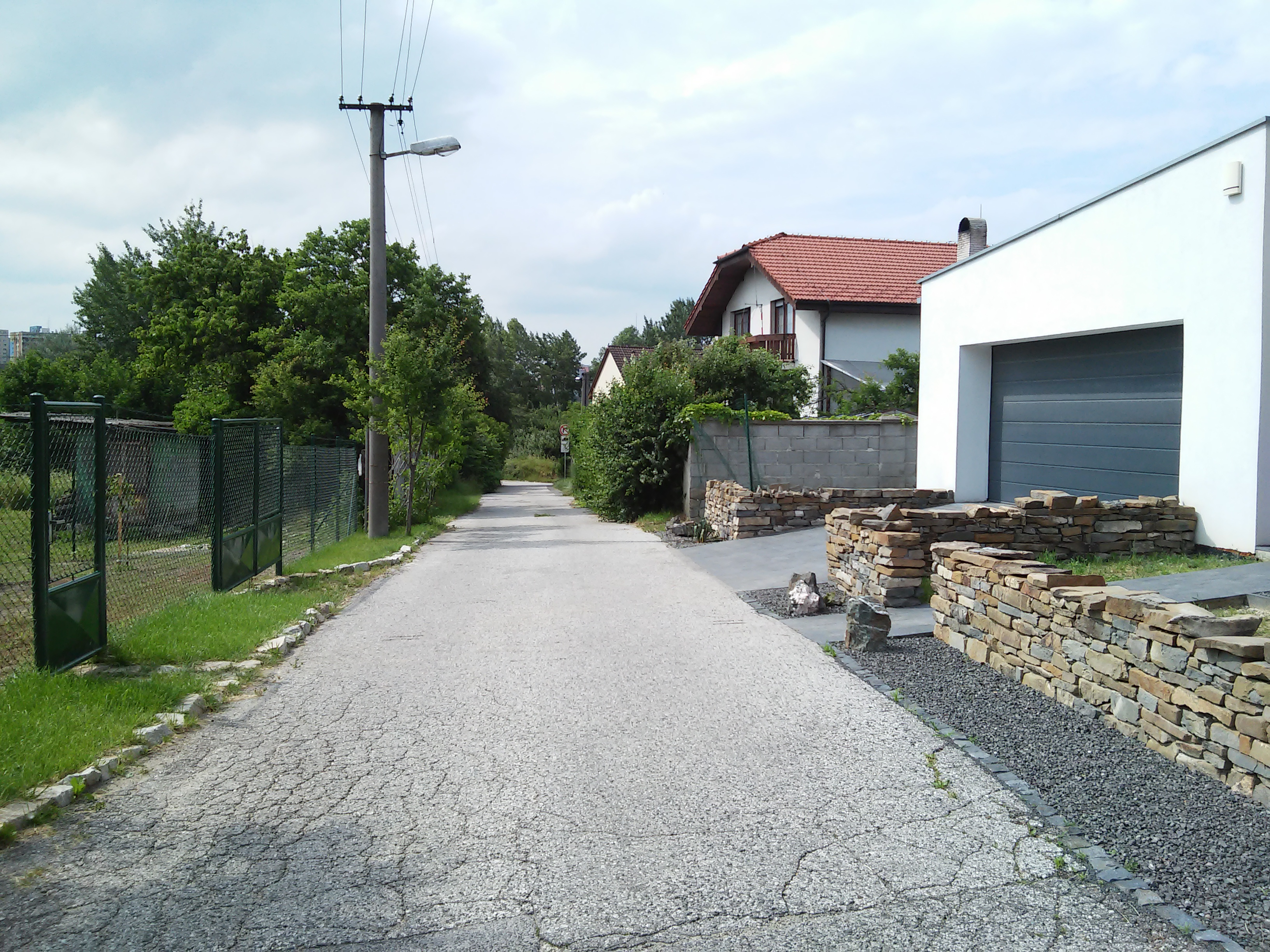 Kuneradská, Lamač, Bratislava